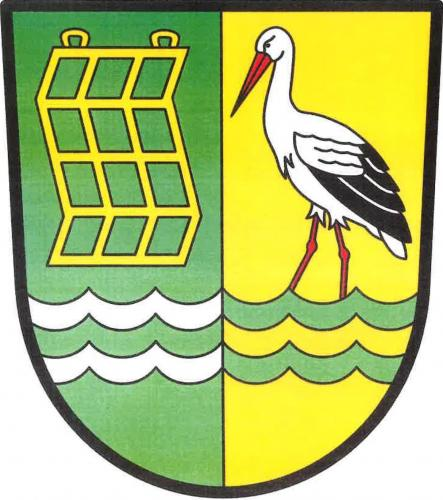 Vlačice znak